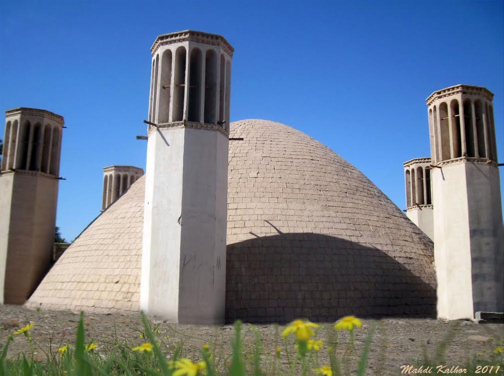 آب‌انبار حاج محمدتقی شهداد با 6 بادگیر.